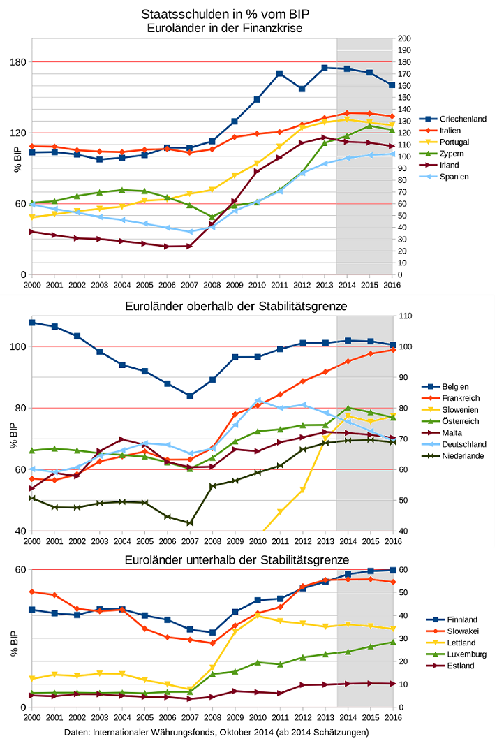 Staatsschulden im Euroraum mit Prognose